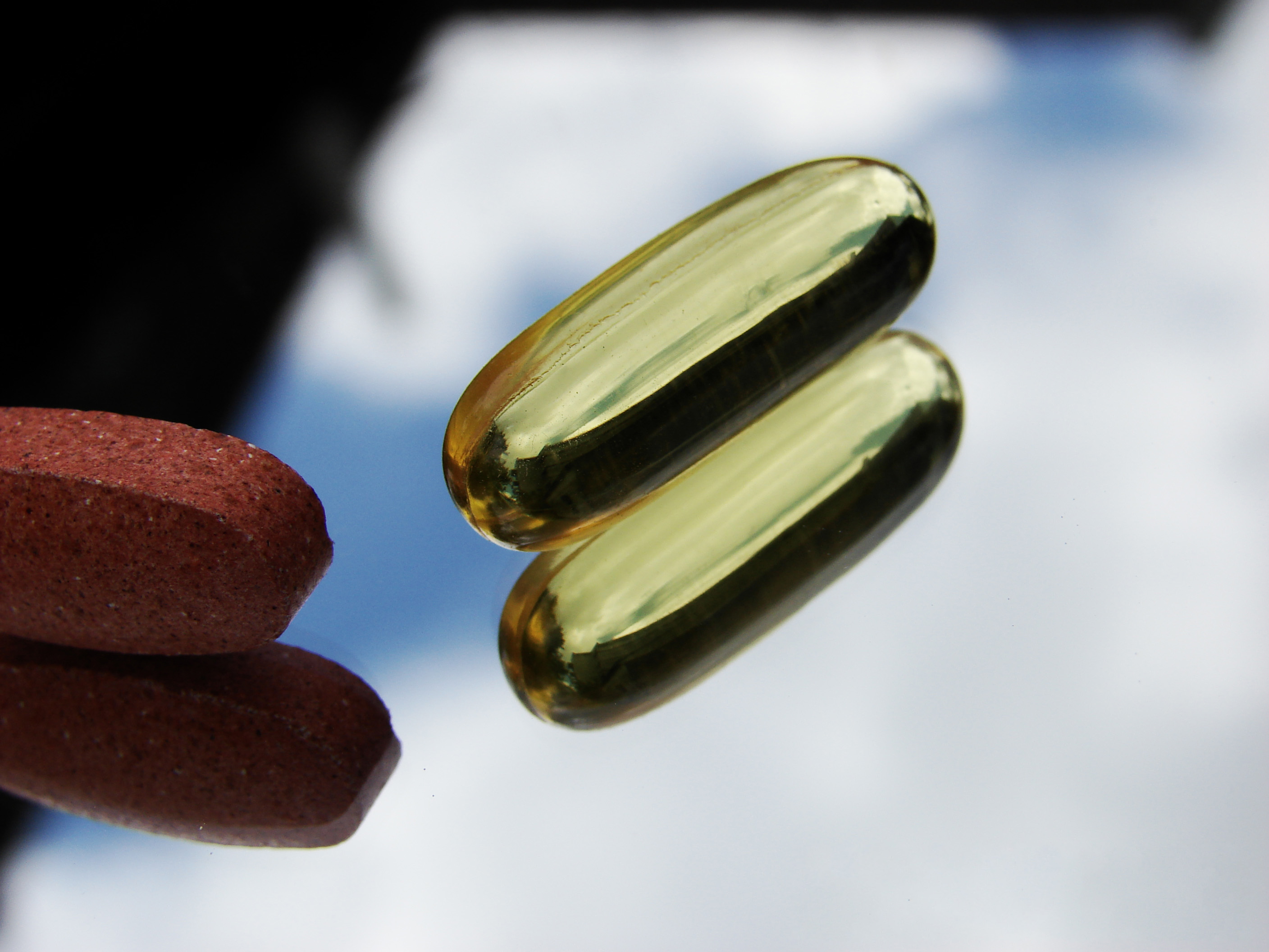 Vitaminske tablete